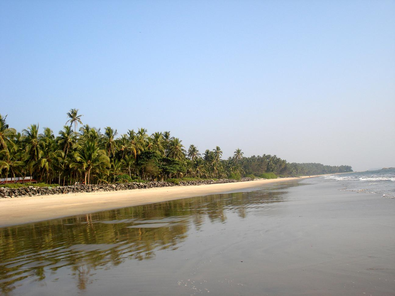 ‘കിഴുന്ന ബീച്ച്’,, കേരളത്തിലെ കണ്ണൂർ ജില്ലയിൽ സ്ഥിതി ചെയ്യുന്ന മനോഹരമായ, ശാന്തസുന്ദരമായ, ഏകാന്തതീരമാണ് കിഴുന്ന കടൽത്തീരം. അടുത്ത കാലത്തായി വിദേശികളും സ്വദേശികളുമായ ധാരാളം സഞ്ചാരികൾ ഈ ഗ്രാമത്തിൽ താമസിച്ച് കടൽത്തീരത്തിന്റെ ഭംഗി ആസ്വദിക്കുന്നുണ്ട്. കണ്ണൂർ പട്ടണത്തിൽ നിന്നും 7 കിലോമീറ്റർ അകലെയാണ് ഈ തീരം.